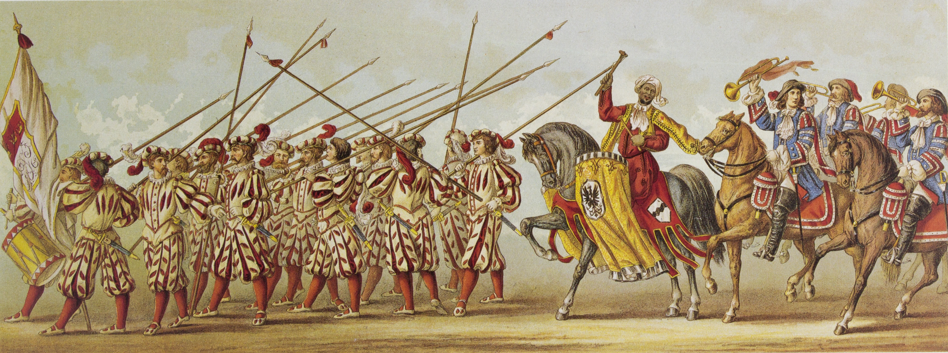 Tony Avenarius: Historischer Festzug veranstaltet bei der Feier der Vollendung des Kölner Doms am 18. October 1880. Tafel XXVI